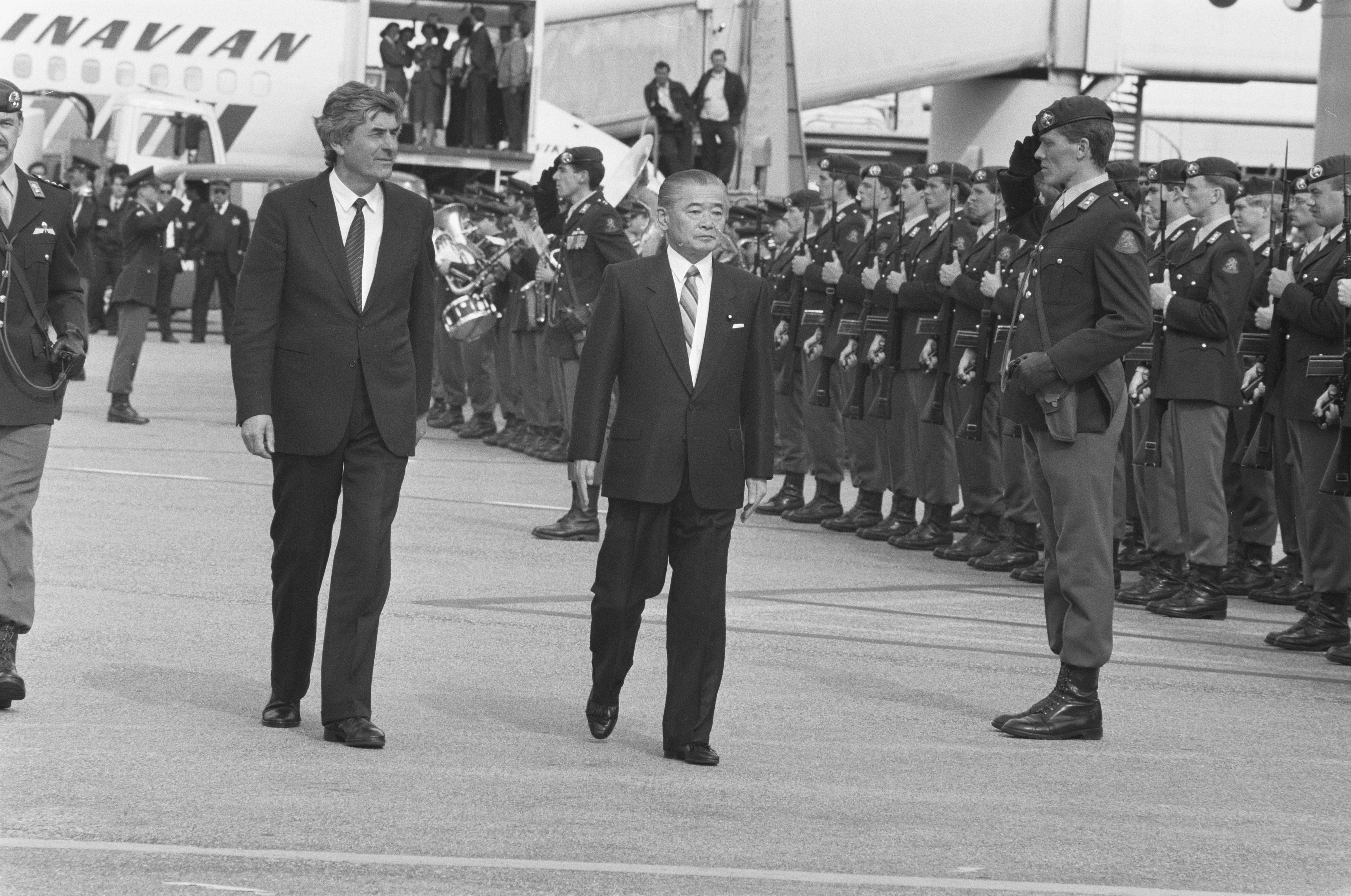 Collectie / Archief : Fotocollectie Anefo Reportage / Serie : [ onbekend ] Beschrijving : Premier Lubbers verwelkomt Japanse premier Takeshita op Schiphol; inspectie erewacht Datum : 3 juni 1988 Trefwoorden : erewachten, inspecties Persoonsnaam : Lubbers, Ruud, Premier Takeshita Fotograaf : Bogaerts, Rob / Anefo Auteursrechthebbende : Nationaal Archief Materiaalsoort : Negatief (zwart/wit) Nummer archiefinventaris : bekijk toegang 2.24.01.05 Bestanddeelnummer : 934-2601